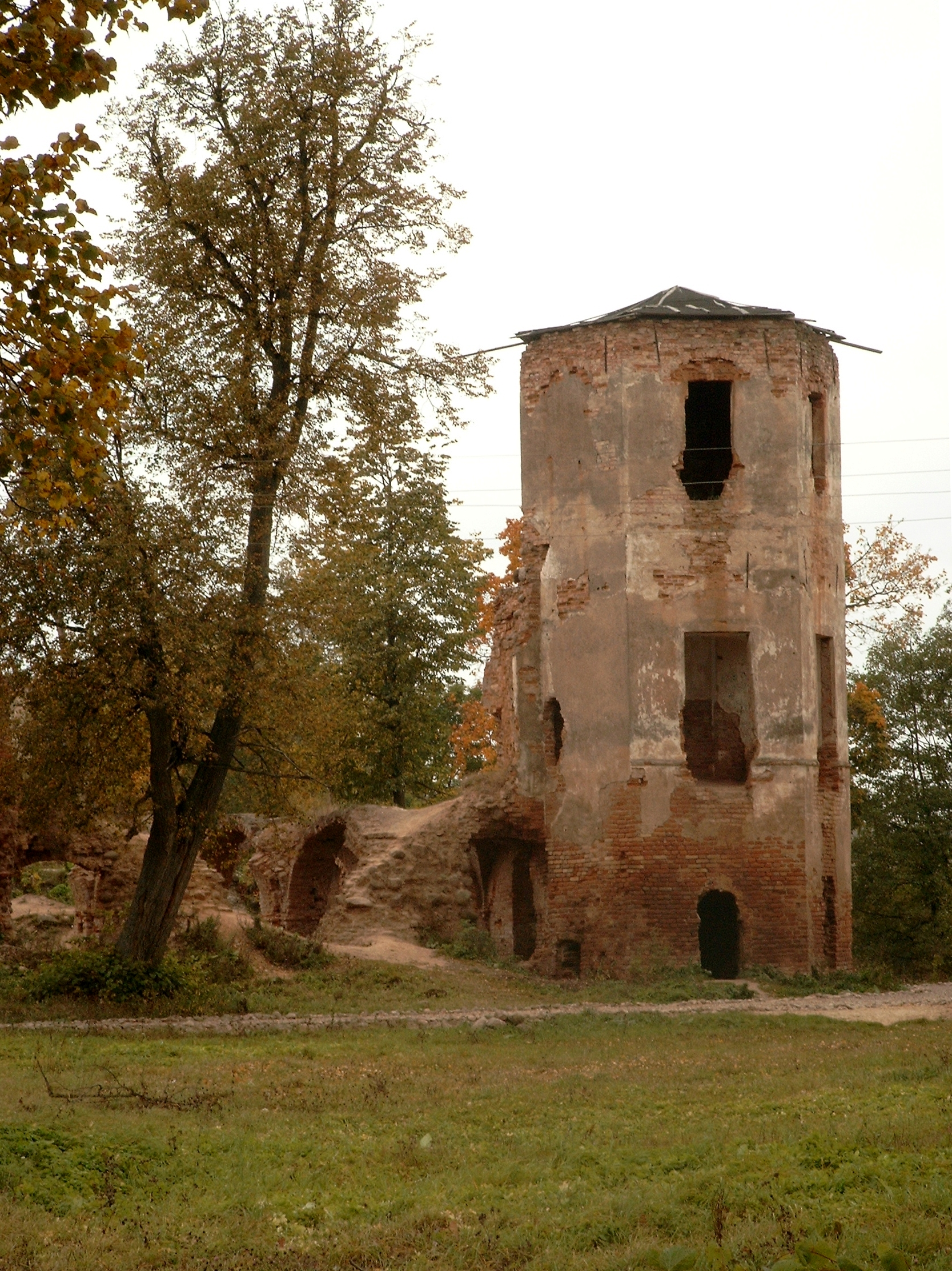 Руины замка Сапегов This is a photo of Belarusian heritage monument. Reference number: 412Г000064 ( WLM)